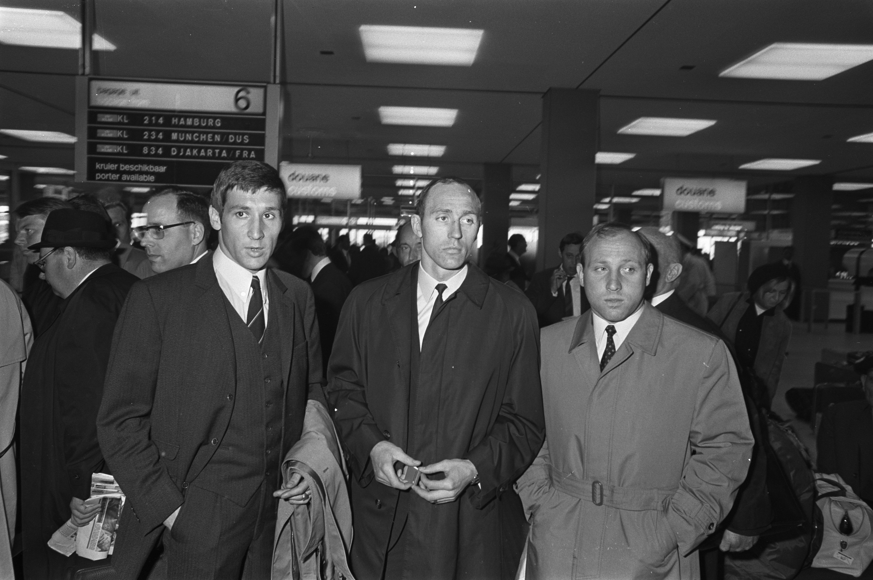 Collectie / Archief : Fotocollectie Anefo Reportage / Serie : [ onbekend ] Beschrijving : Aankomst HSV Hamburg op Schiphol. Frans Honig , Willy Schultz en Uwe Seeler Annotatie : HSV zou op 23 mei 1968 in Rotterdam de Europacup II finale spelen tegen Inter Milan Datum : 20 mei 1968 Locatie : Schiphol Trefwoorden : vliegvelden, voetballers Persoonsnaam : Honig, Frans, Schultz, Willy, Seeler, Uwe Fotograaf : Nijs, Jac. de / Anefo, [onbekend] Auteursrechthebbende : Nationaal Archief Materiaalsoort : Negatief (zwart/wit) Nummer archiefinventaris : bekijk toegang 2.24.01.05 Bestanddeelnummer : 921-3677